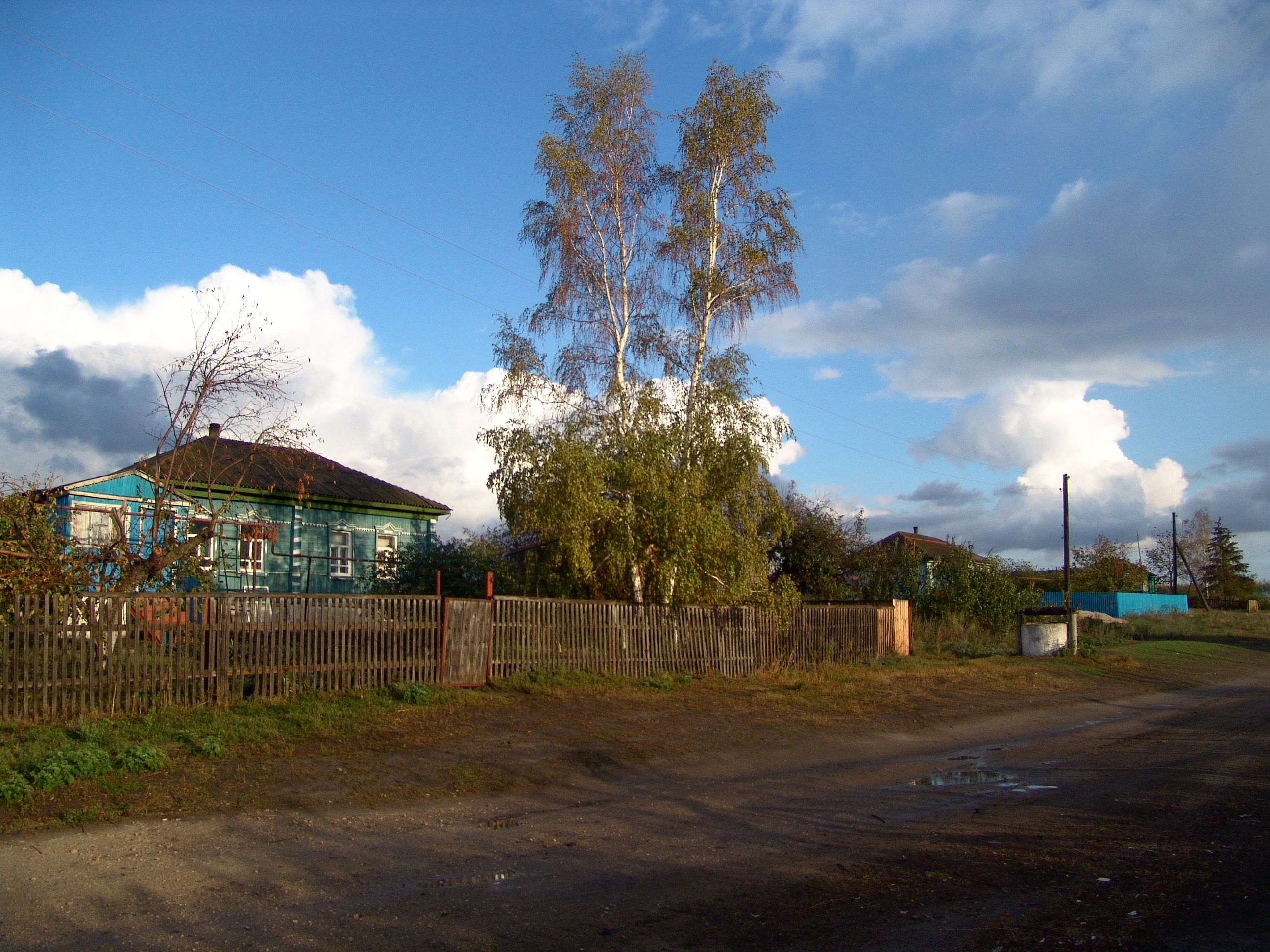 Село Сукмановка Жердевского района Тамбовской области, улица Проезжая, сентябрь 2010 года.